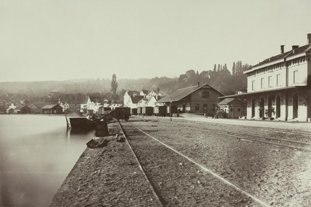 Station Wädenswil (damals Wädensweil))